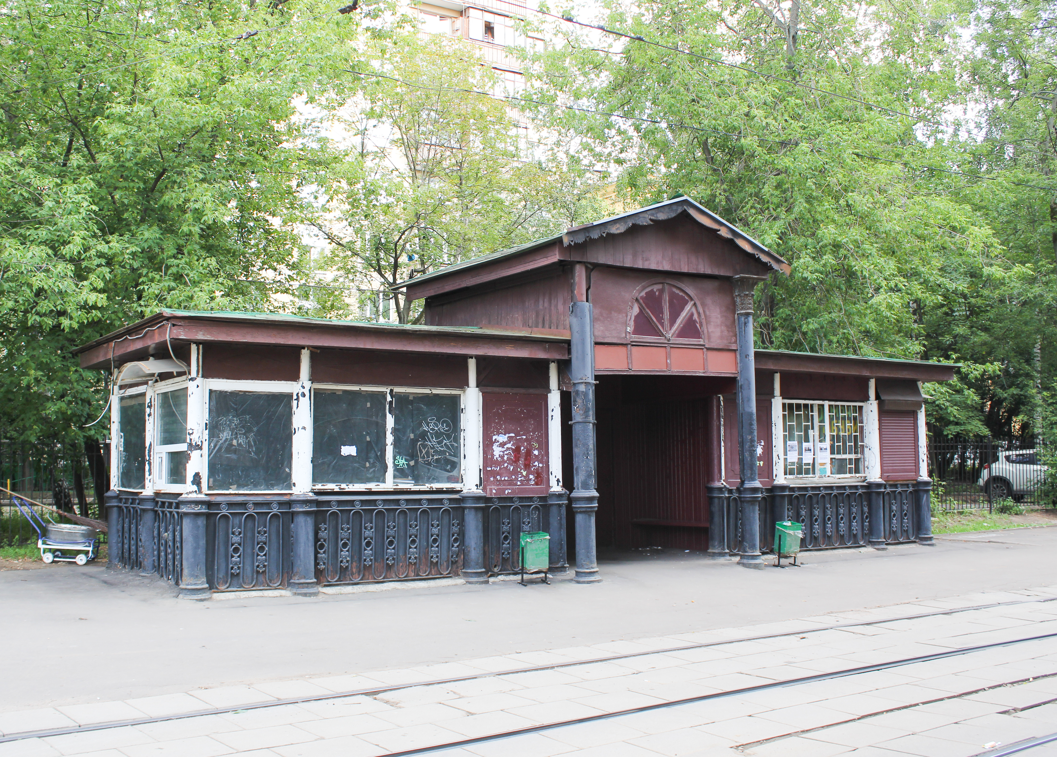 трамвайная остановка «Красностуденческий проезд» — вблизи Красностуденческого проезда (построена в конце XIX века по проекту архитектора Ф. А. Когновицкого, является старейшим павильоном наземного общественного транспорта в Москве